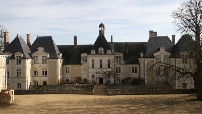 Le château de Marcilly côté cour.